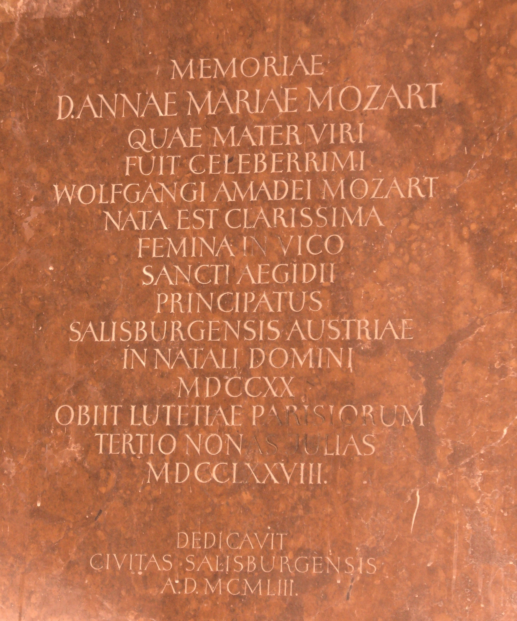 Plaque commémorative sur la mère de Mozart, décédée à Paris. Cette plaque se trouve dans l'église Saint-Eustache.